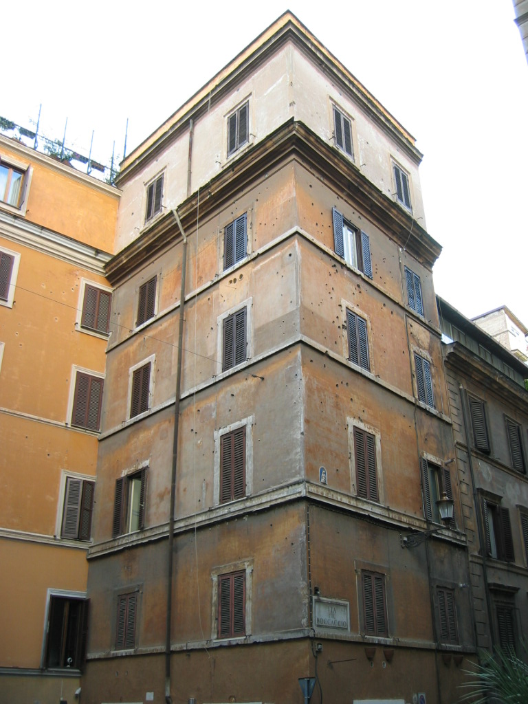 Byggnader vid Via Rasella, Rom. Fotograf: Torvindus.